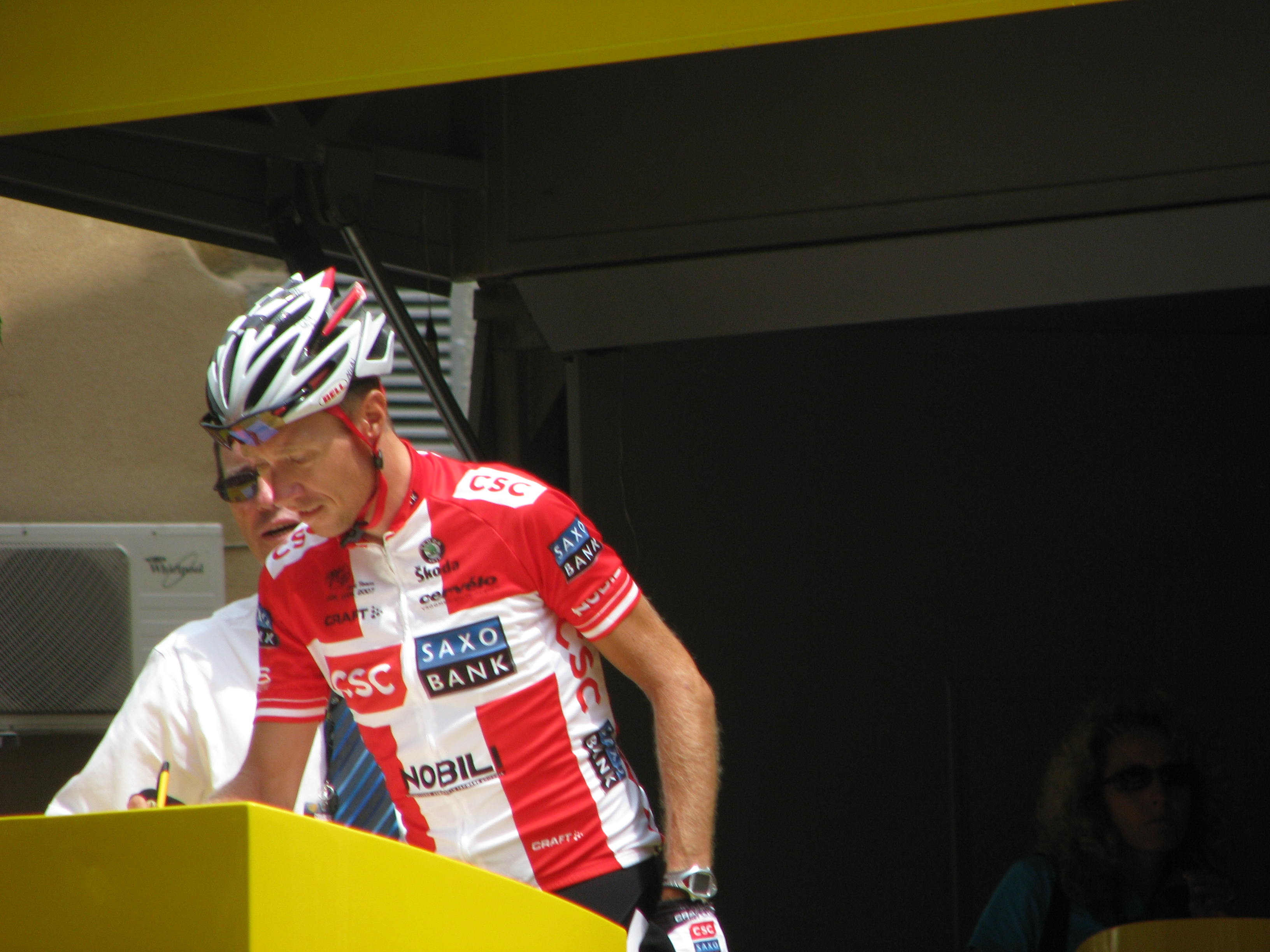 Nicki Sorensen avant départ de la 7ème étape du Tour de France 2008 (Brioude-Aurillac)